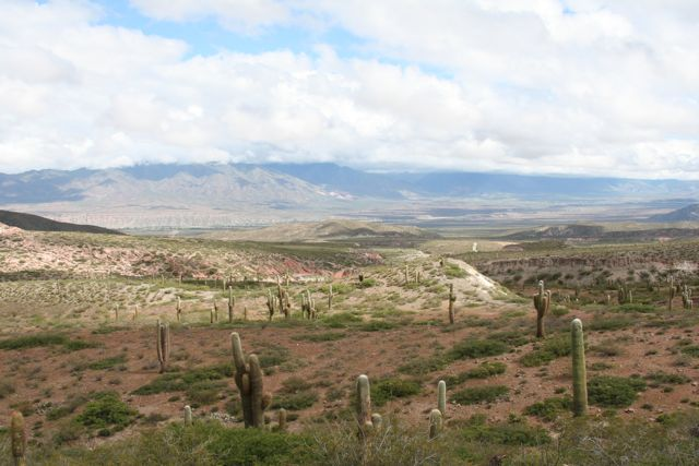 Blick auf Payogosta